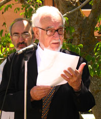 Pedro MONTSERRAT RECODER, Doctor en Ciencias Naturales, Profesor de Investigación Científica, Fundador del Instituto Pirenaico de Ecología, Consejo Superior de Investigaciones Científicas de Jaca. Imaten tomada en el homenaje que se le hizo en Jaca con motivo de la dedicatoria de un Parque de la ciudad con su nombre el 29 de junio de 2005, día de San Pedro.